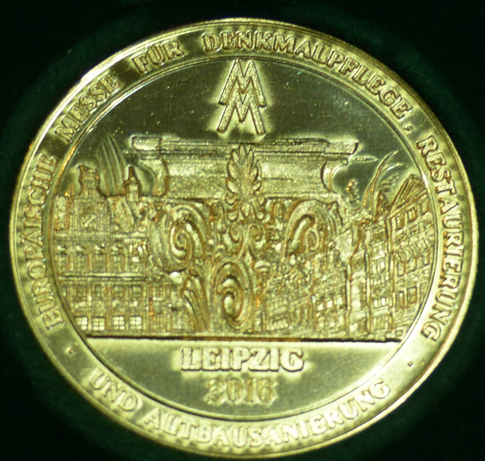 Verleihung einer von zehn "Goldmedaillen für herausragende Leistungen in der Denkmalpflege in Europa" an Wikimedia Deutschland e.V. auf der Europäischen Denkmalmesse in Leipzig 2016 am 12. November 2016